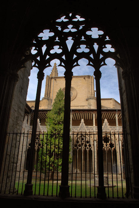 Tracería del lado sur del claustro. Al fondo el lado norte del mismo y la fachada sur de la catedral de Pamplona